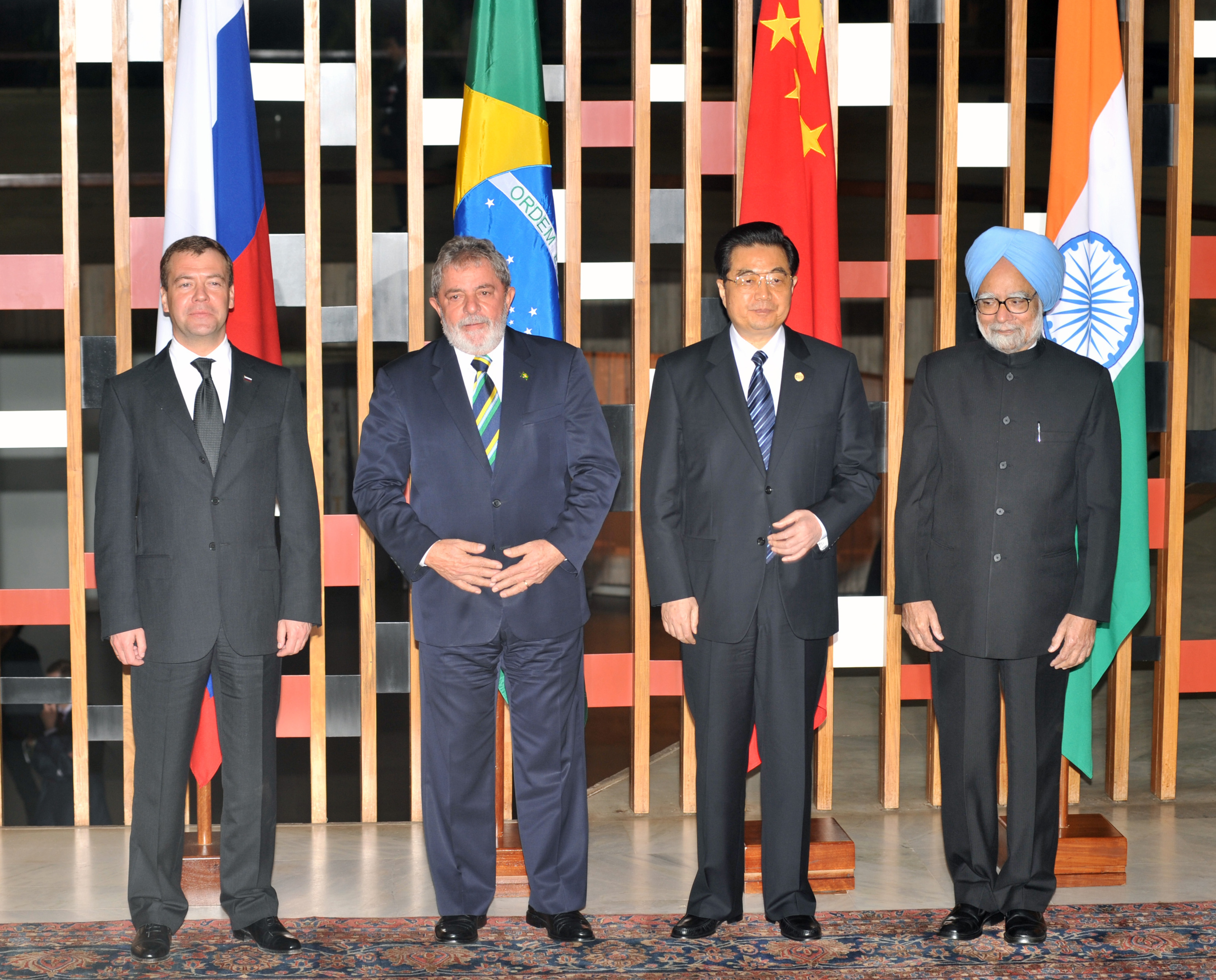 Brasília - O presidente da Rússia, Dmitri Medvedev, o presidente Lula, o presidente da China, Hu Jintao, e o primeiro-ministro da Índia, Manmohan Singh, posam para a foto oficial durante a 2ª Cúpula de Chefes de Estado e de Governo do BRIC.